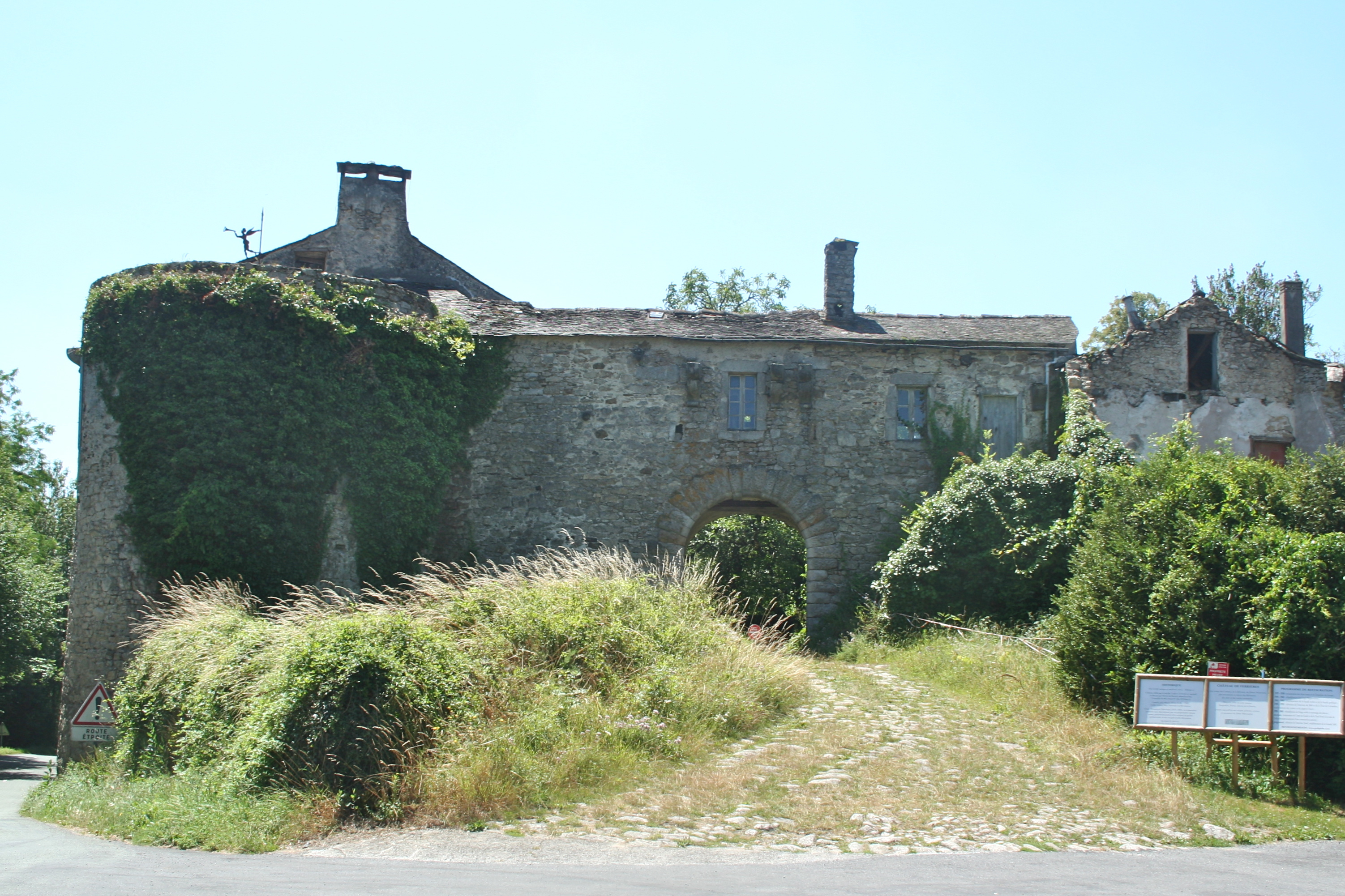 Ferrières (Tarn) - château